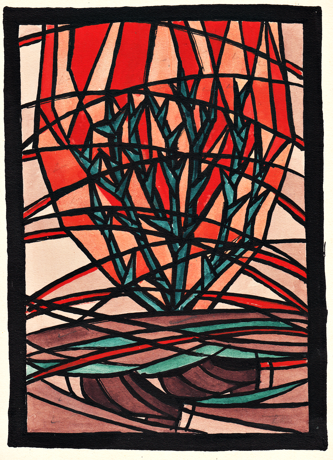 1955, Günter Johl, "Berufung Mose", farbiger Entwurf für das Turmfenster der evangelischen Friedenskirche in Wersen-Büren. Der Entwurf befindet sich im Besitz der Tochter des Künstlers, Amadee Vorsteher-Johl.